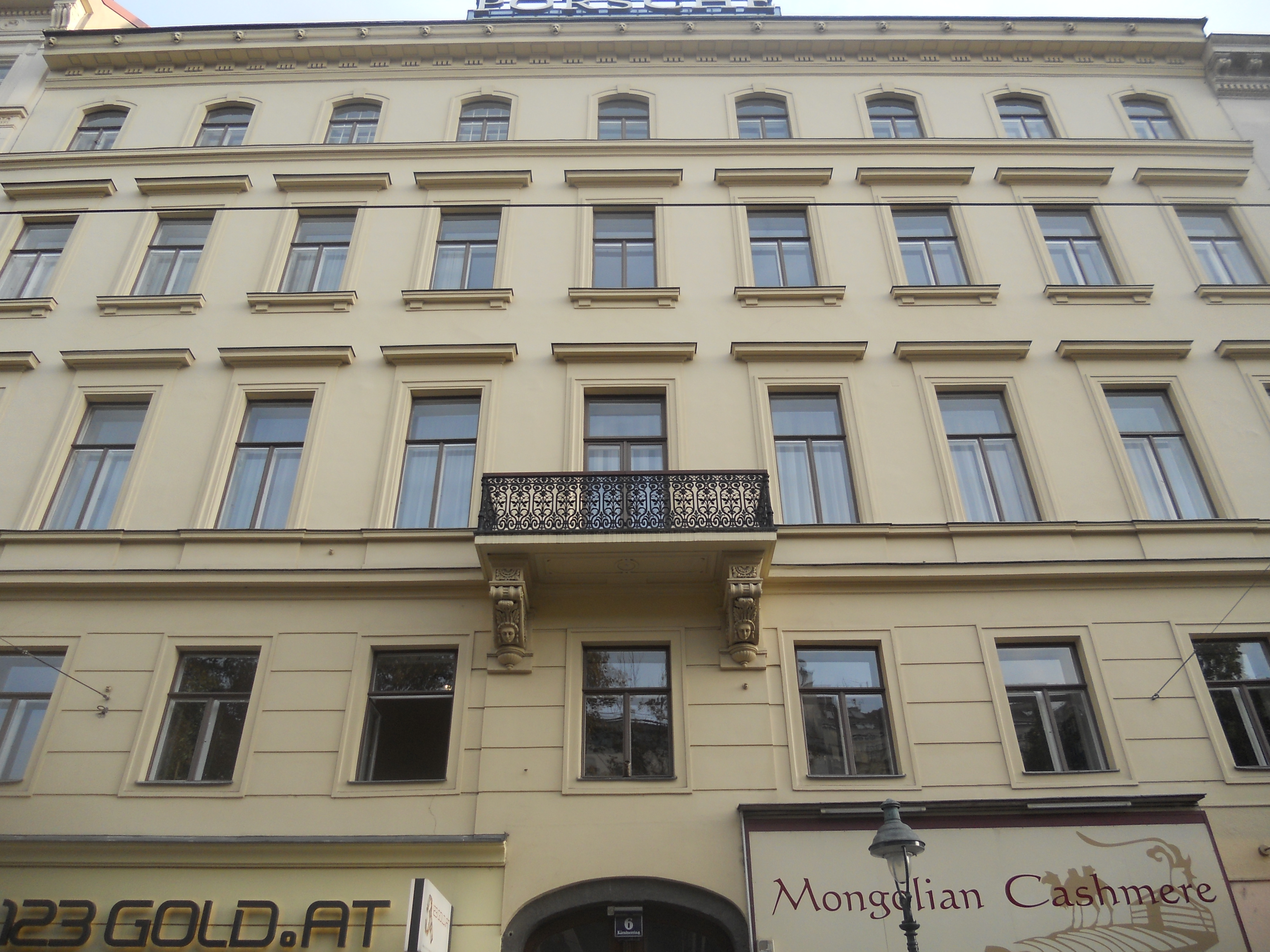 Haus Kärntner Ring 6 in Wien